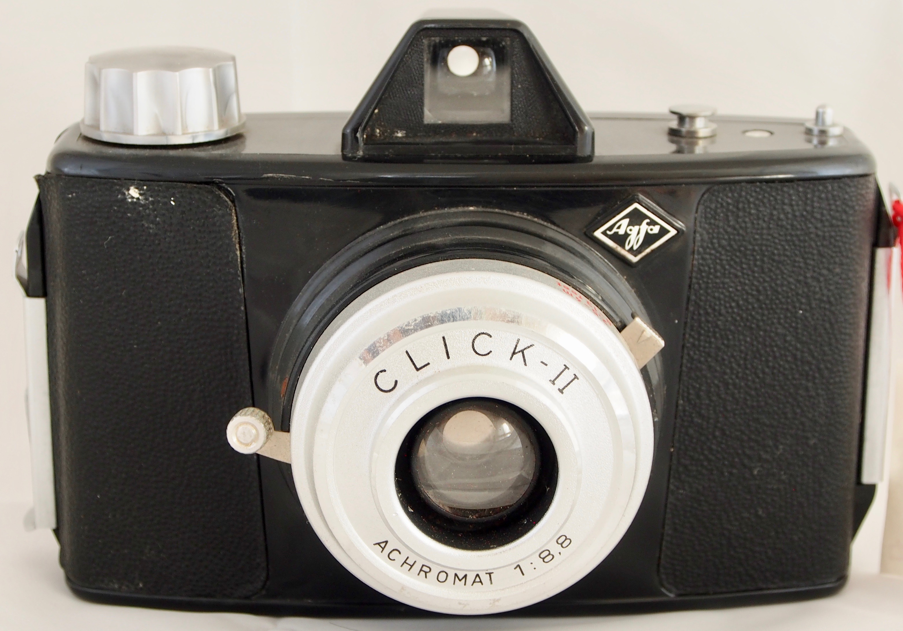 Click II Kadl# 1300